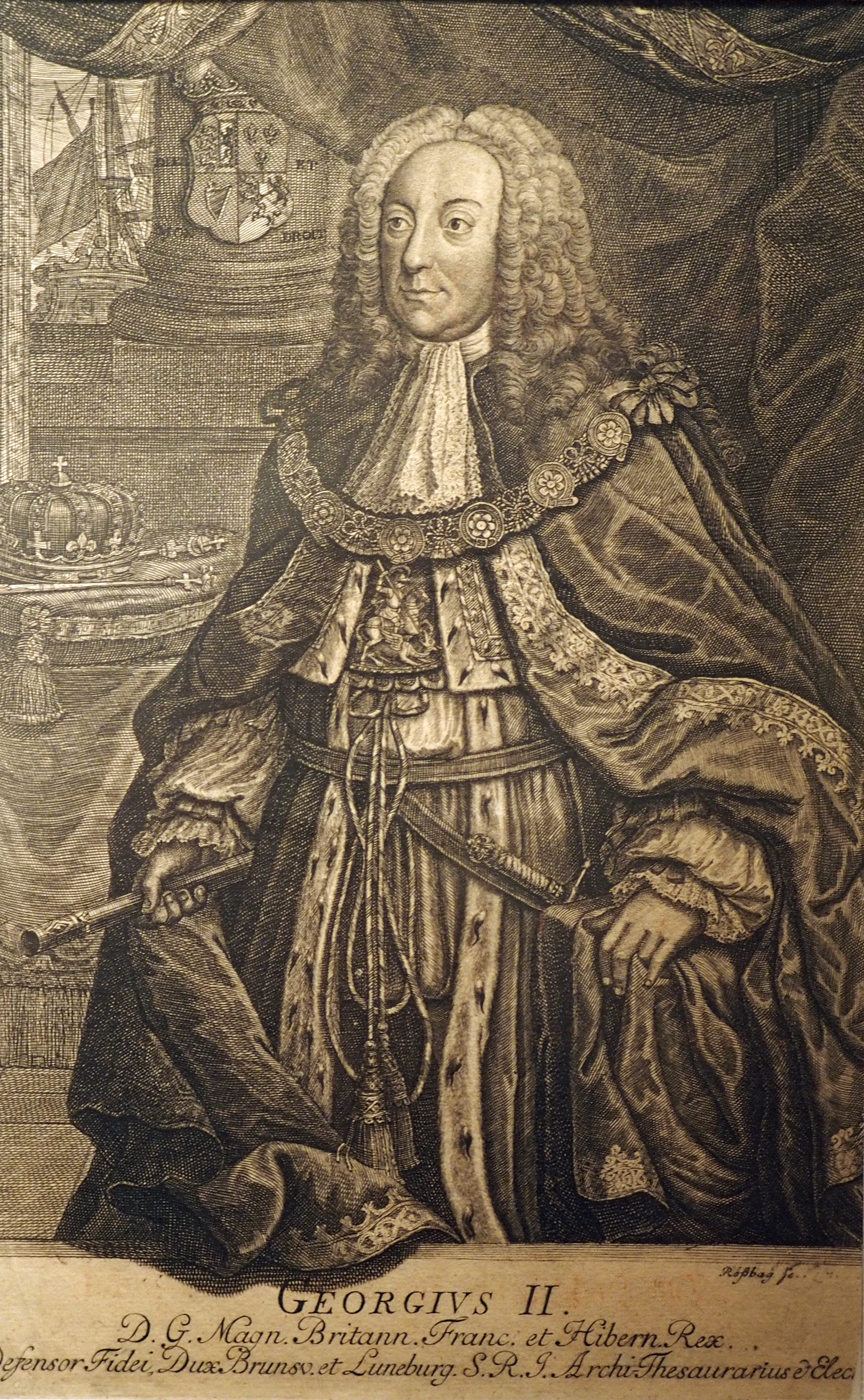 Georg II. (1683-1760), Kurfürst von Hannover, König von Großbritannien und Irland